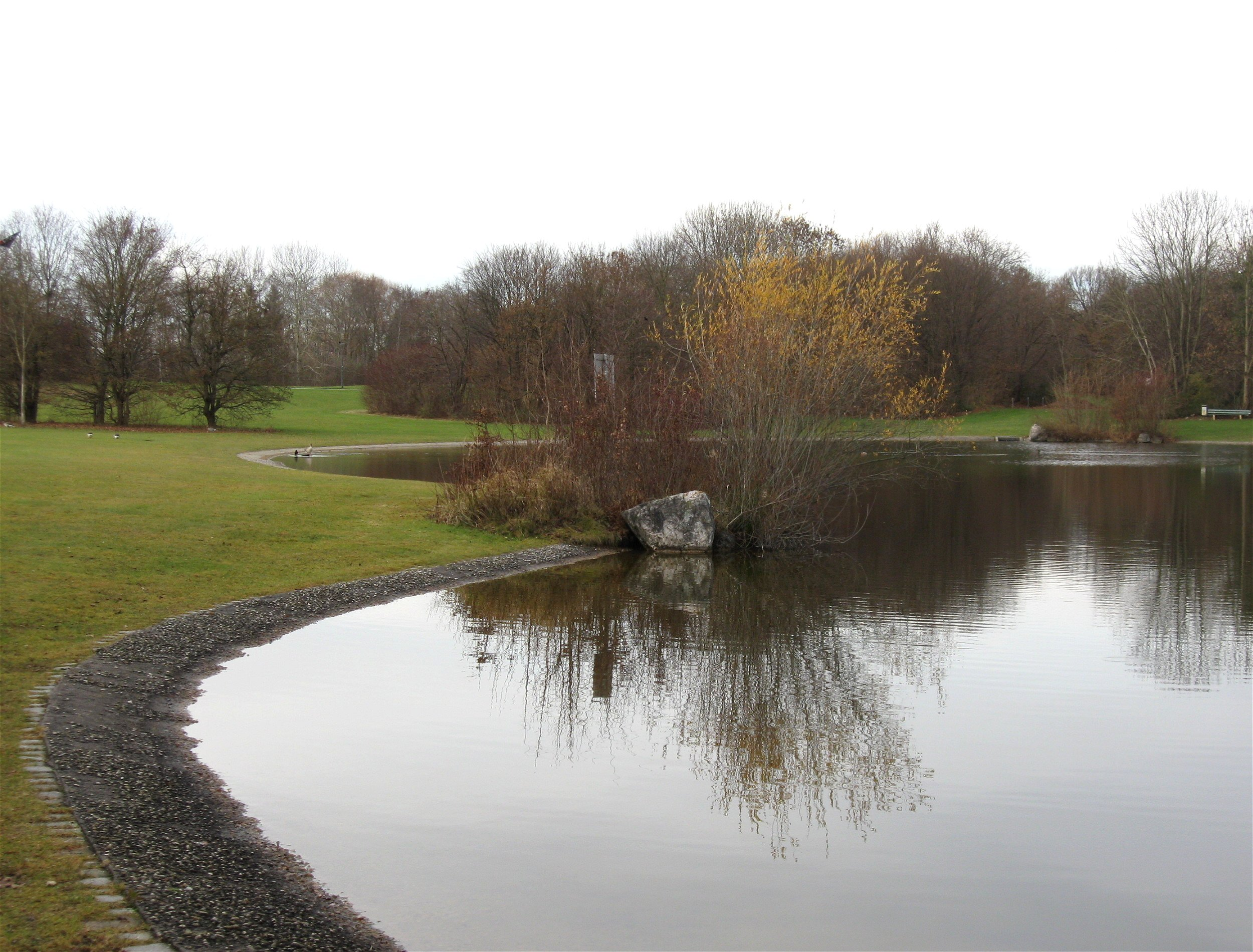 Ostpark in München